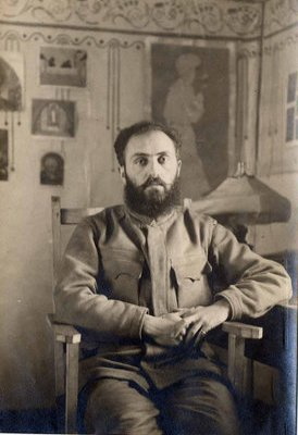 Baróti József (1886-1940) a hadifogságban 1917-ben.